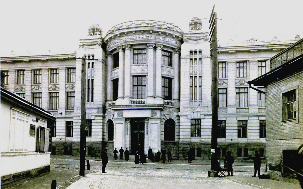 Дворец медицины - здание для Харьковского медицинского общества и Пастеровского института (Харьков, Пушкинская, 14), построено по проекту А. Н. Бекетова (1910—1913).